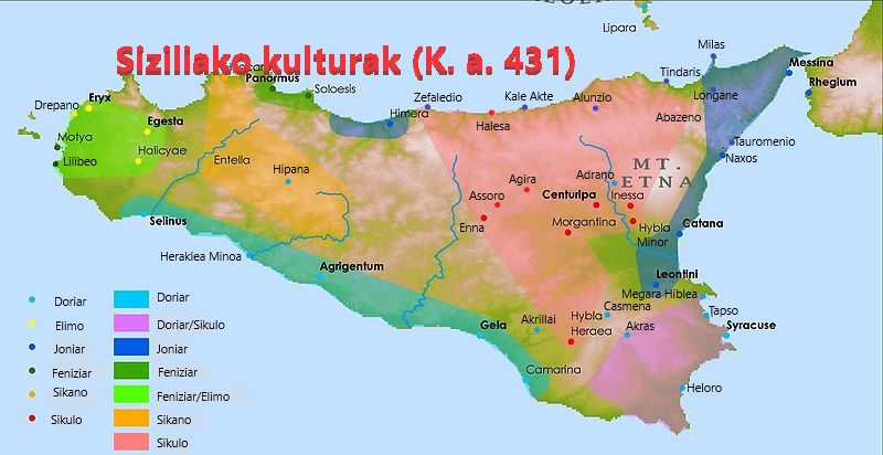 Siziliako kulturak (K. a. 431)